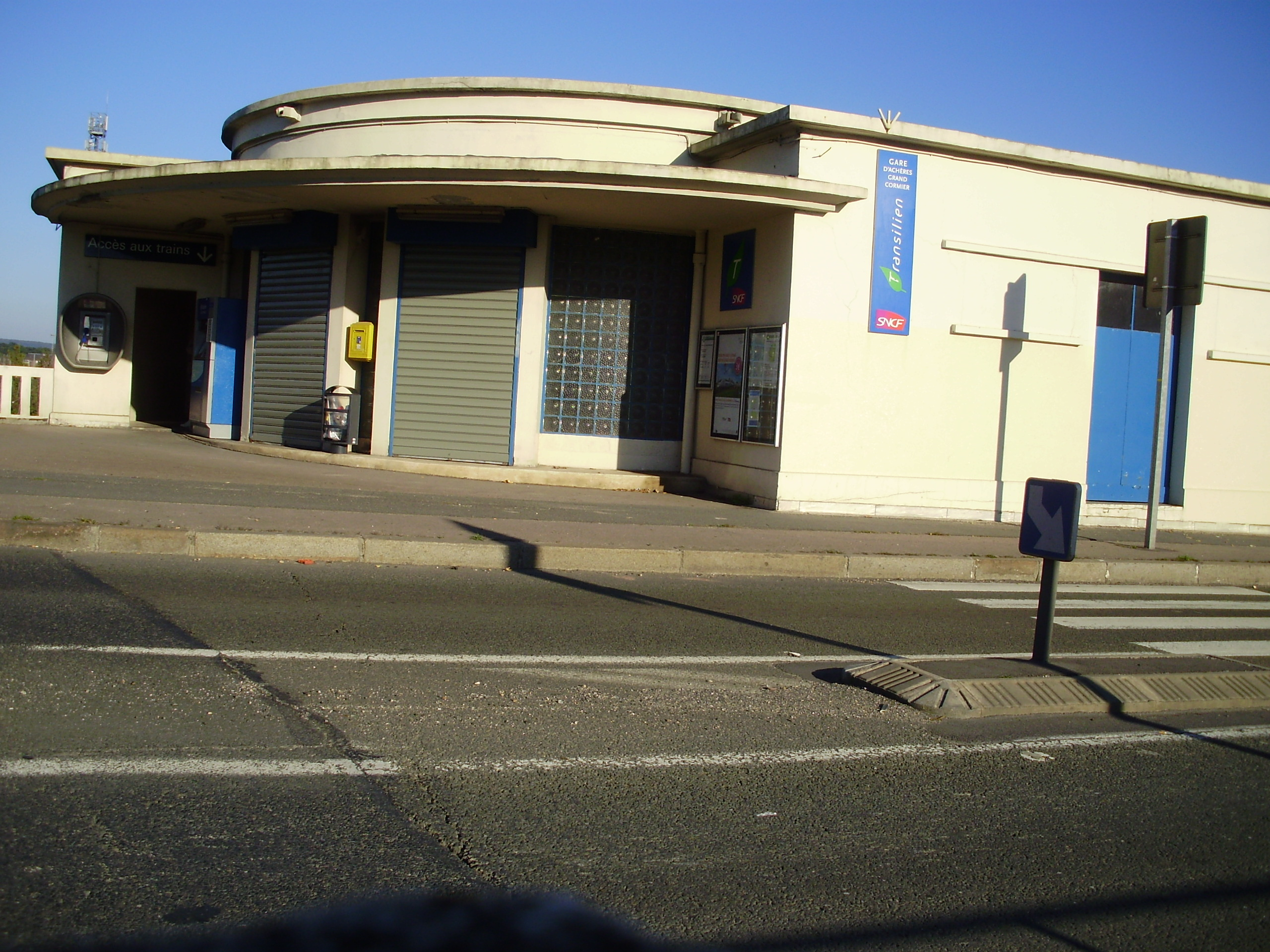 Gare d'Achères - Grand Cormier, à Saint-Germain-en-Laye, Yvelines, France (bâtiment de la gare)